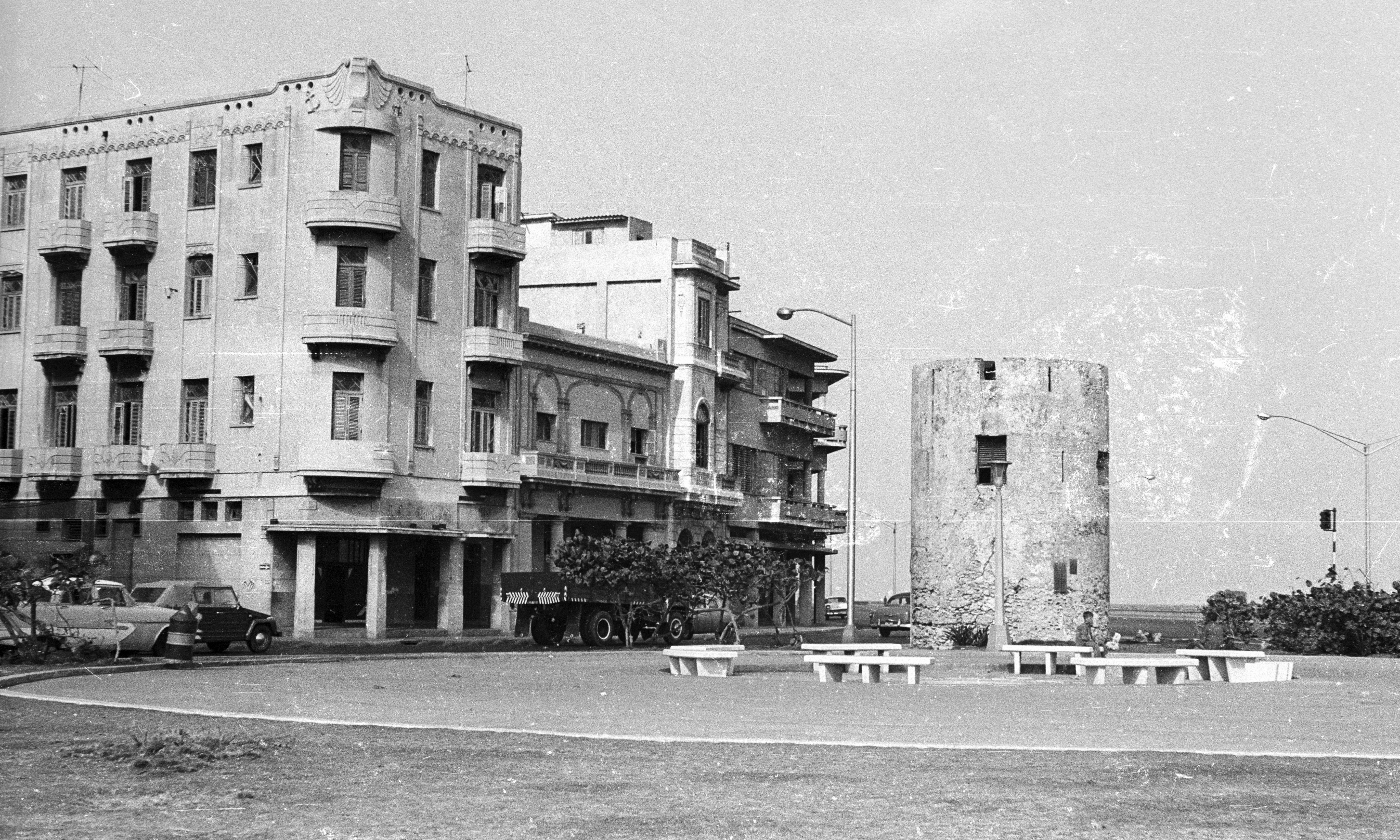 Malecón, a Szent Lázár torony a Parque Antonio Maceo sarkán. Location: Cuba, La Habana Title: Malecón, a Szent Lázár torony a Parque Antonio Maceo sarkán.